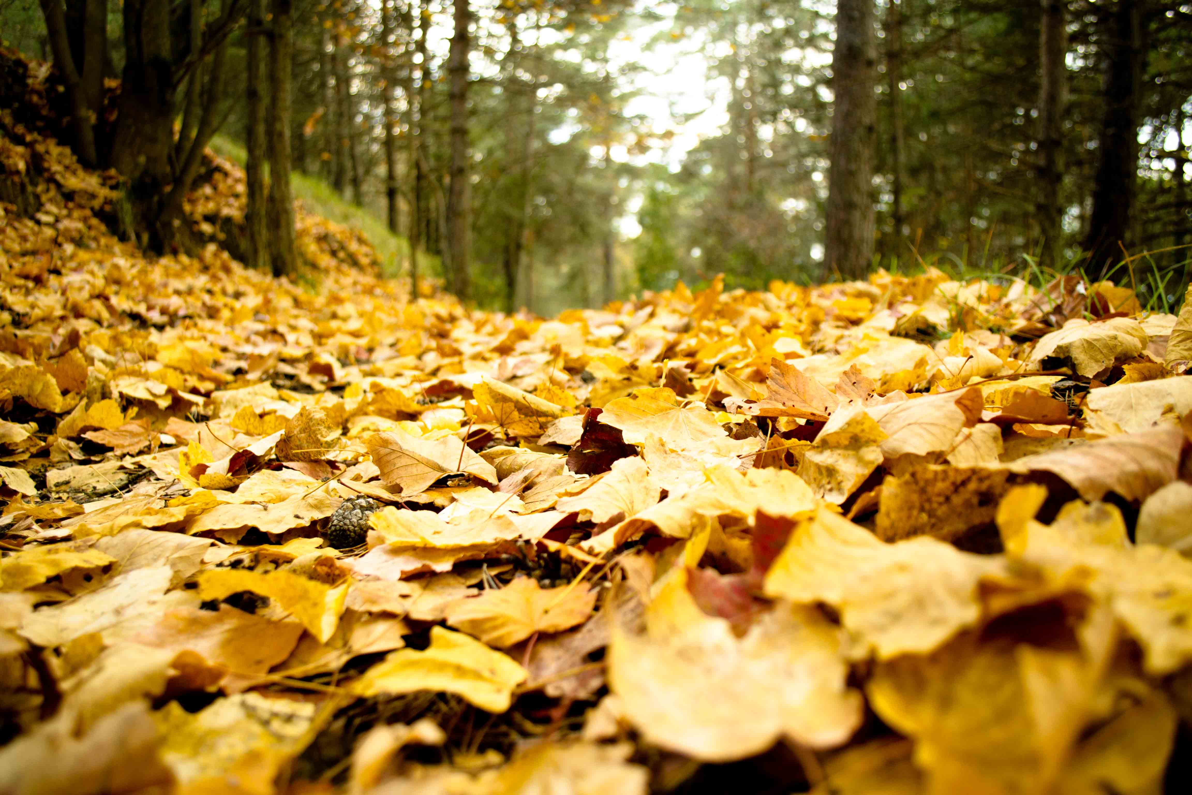 Photo prise de feuilles mortes.